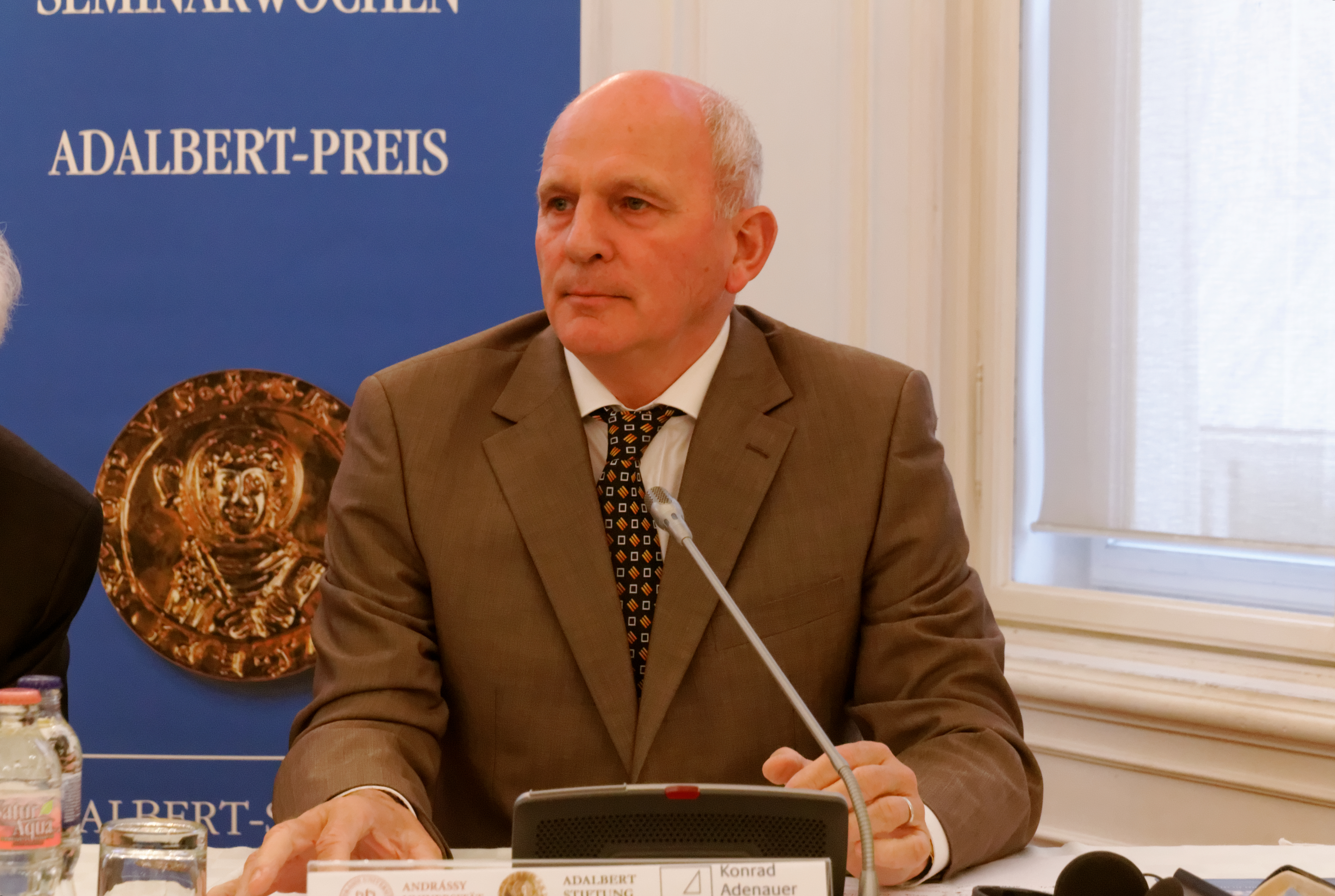 František Mikloško in der Andrássy Universität Budapest